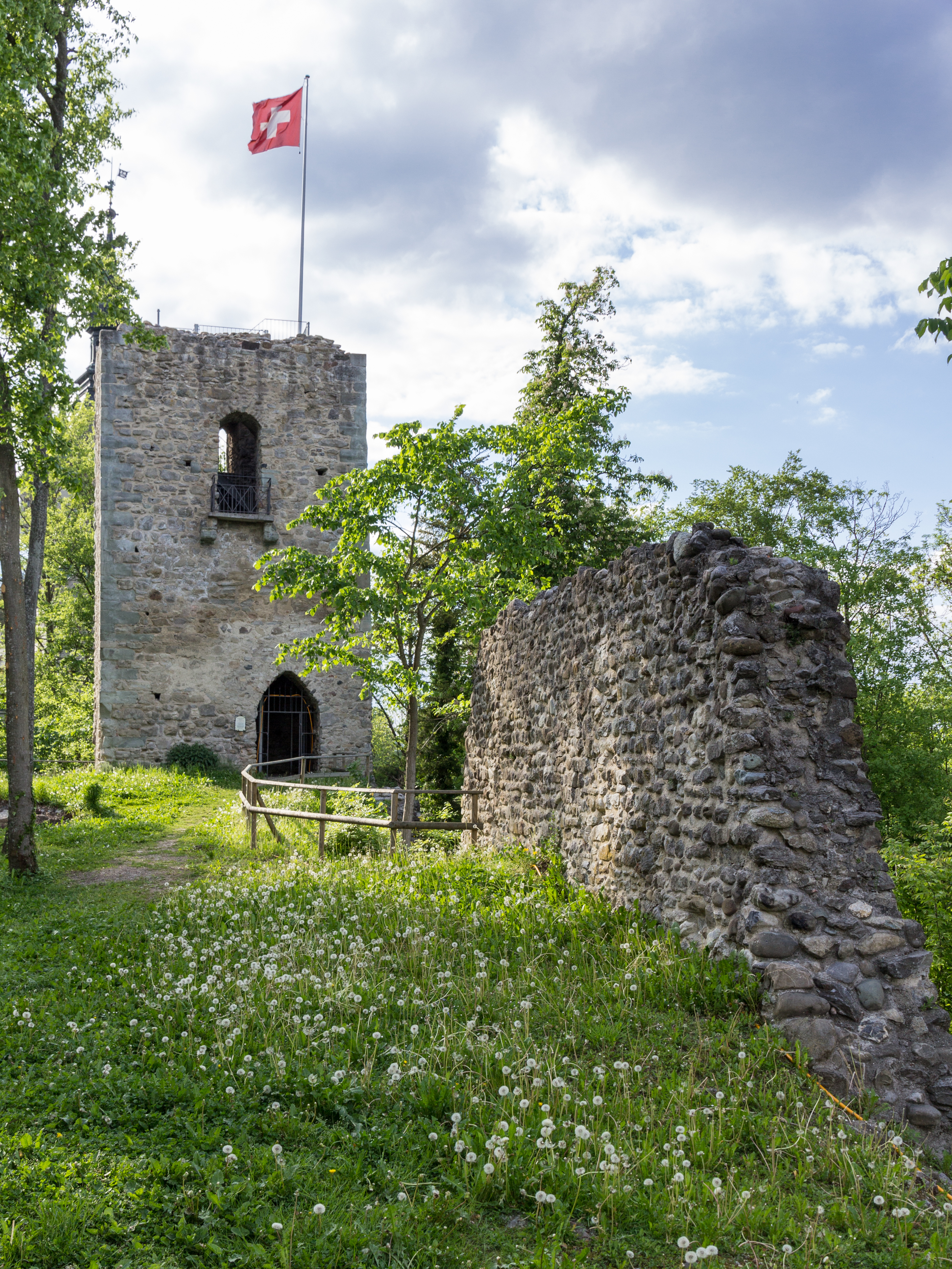 Turm und Mauerreste des im Schwabenkrieg (1499) zerstörten Castell Tägerwilen.